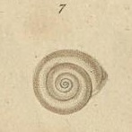 Urticicola umbrosa Pfeiffer 1828, Hygromiidae, Stylommatophora, Pulmonata, Gastropoda, Holotype, cropped from Carl Jonas Pfeiffer: Naturgeschichte deutscher Land- und Süsswasser-Mollusken. Dritte Abtheilung. pp. 1-84, Weimar. Landes-Industrie-Comptoir, 1828, pl. 6, fig. 7.